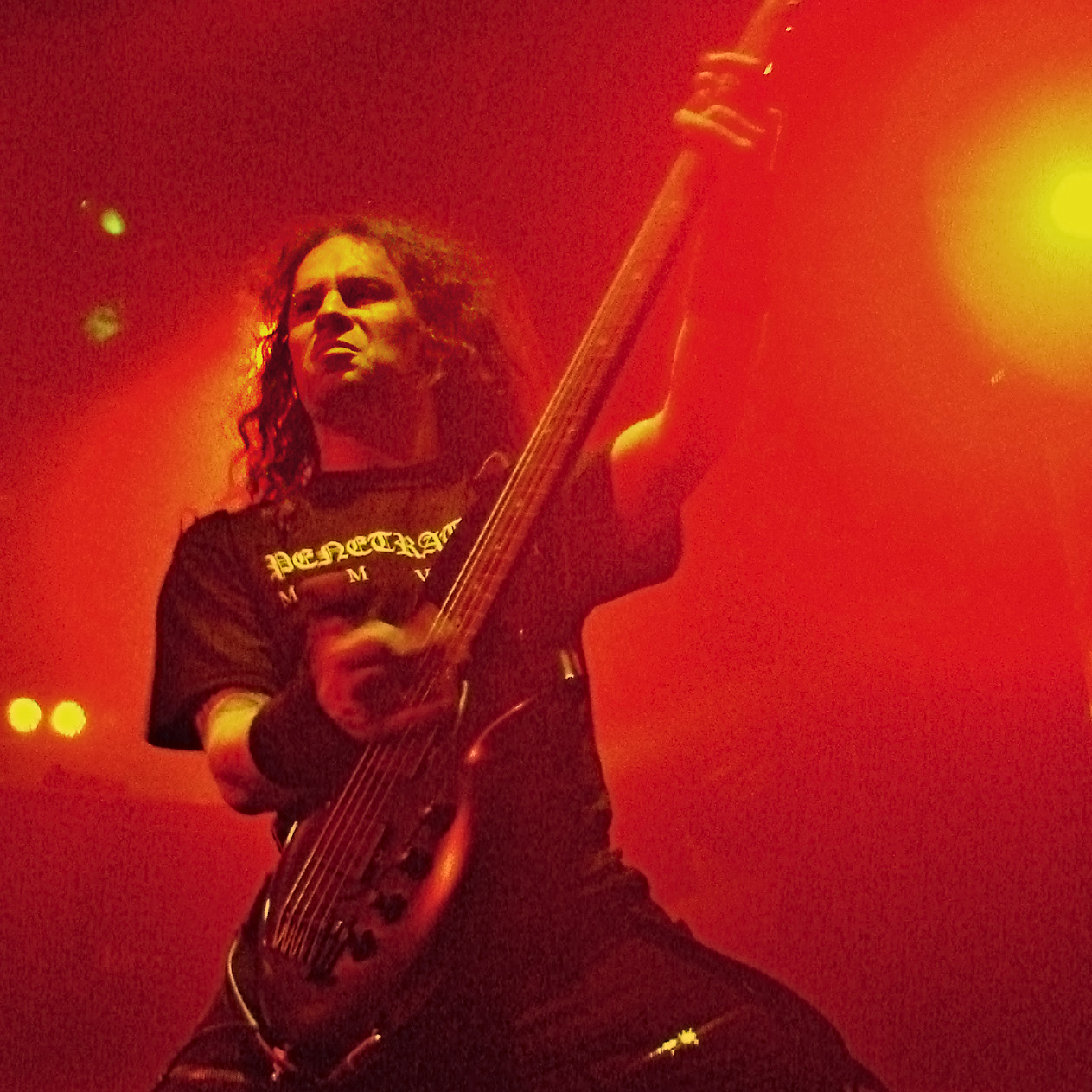 Vader en concert à la Locomotive, à Paris, le 01/05/08: Novy (Marcin Nowak).